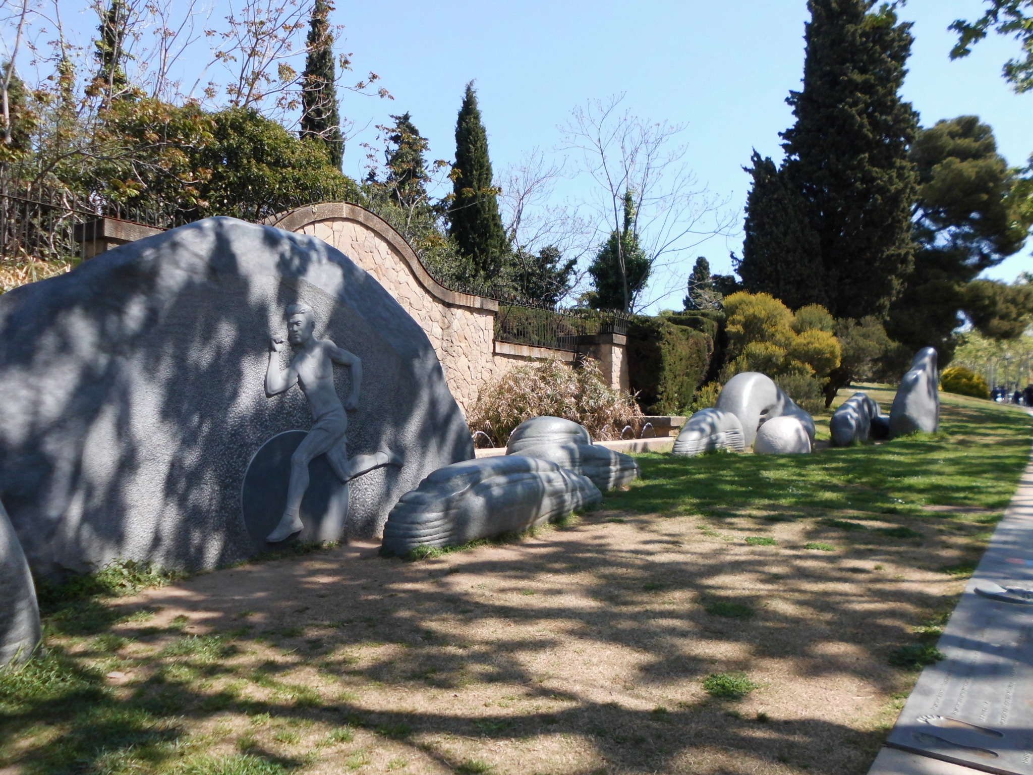 Monuments simbòlics de la província de Kyonggi a Barcelona (Kang Dae-Chul). Av. de l'Estadi, davant de l'Estadi Olímpic (Barcelona)